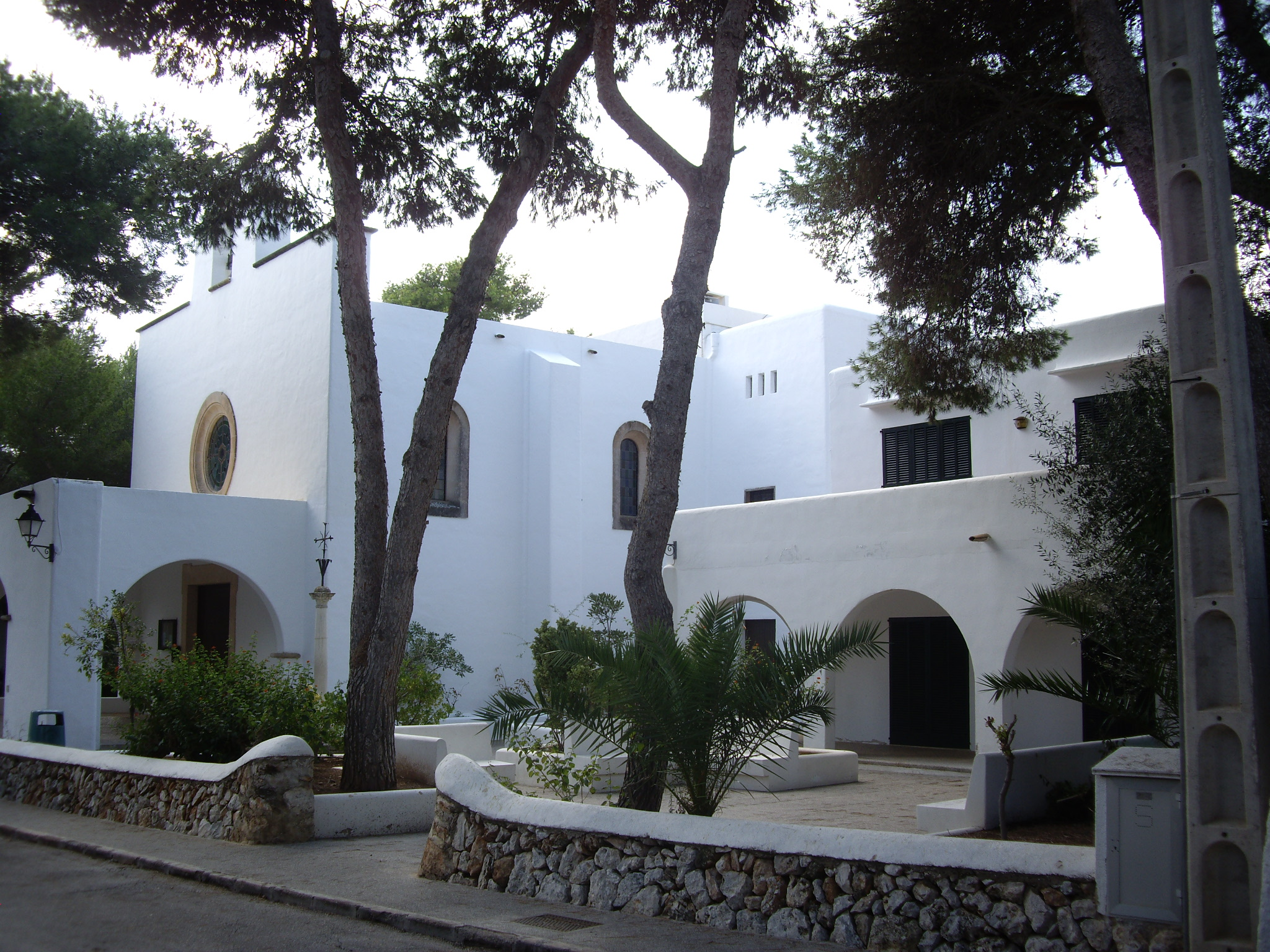 Església de Cala d'Or d'estil eivissenc. Es troba a la plaça de la Figuera